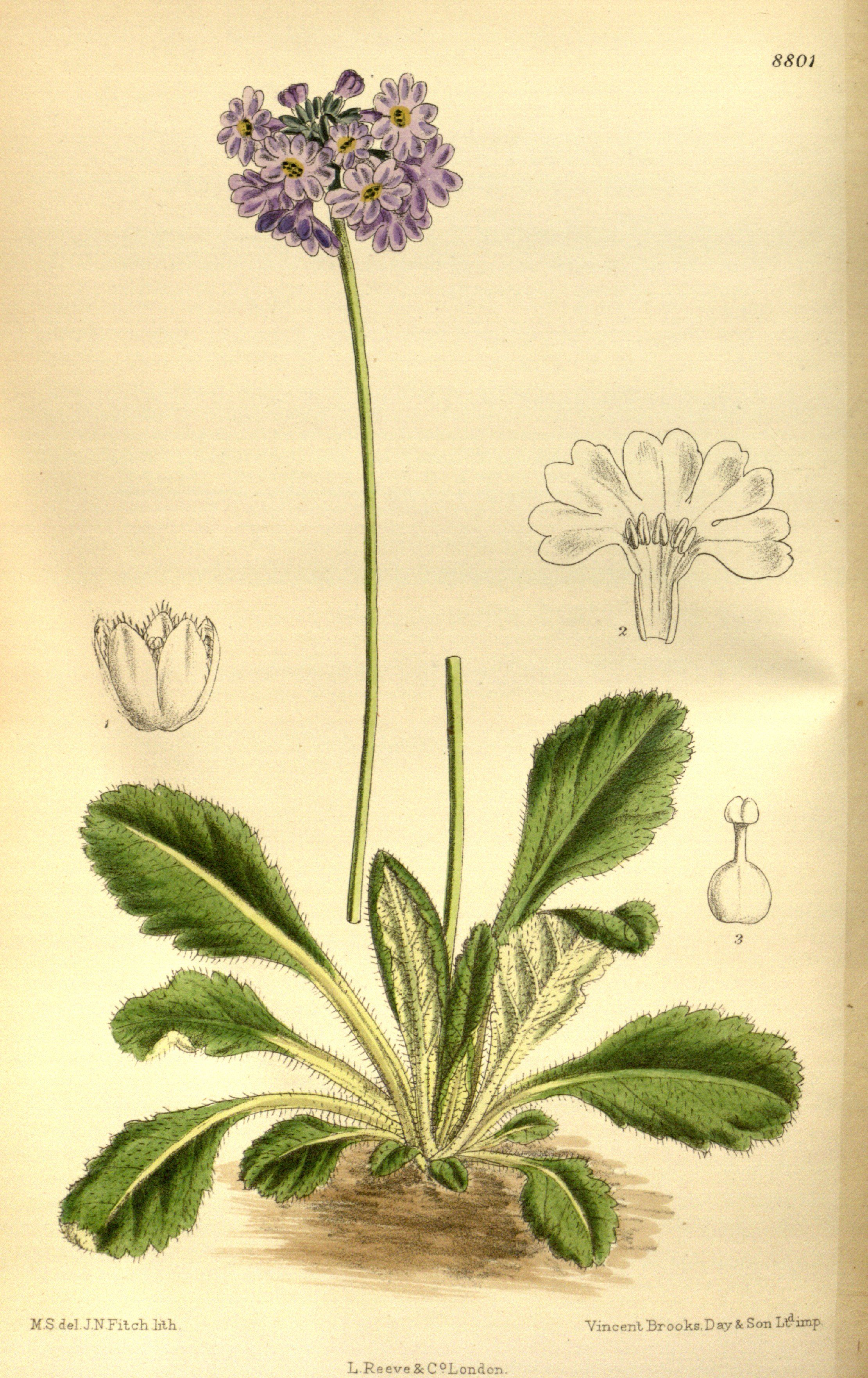 Primula bellidifolia, Primulaceae